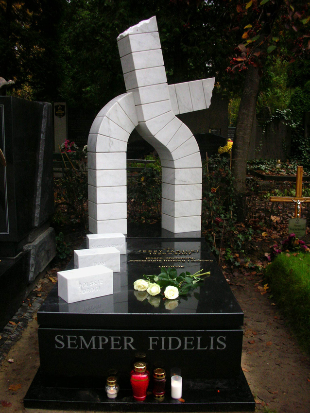 Grób Jerzego Janickiego na Powązkach Wojskowych w Warszawie